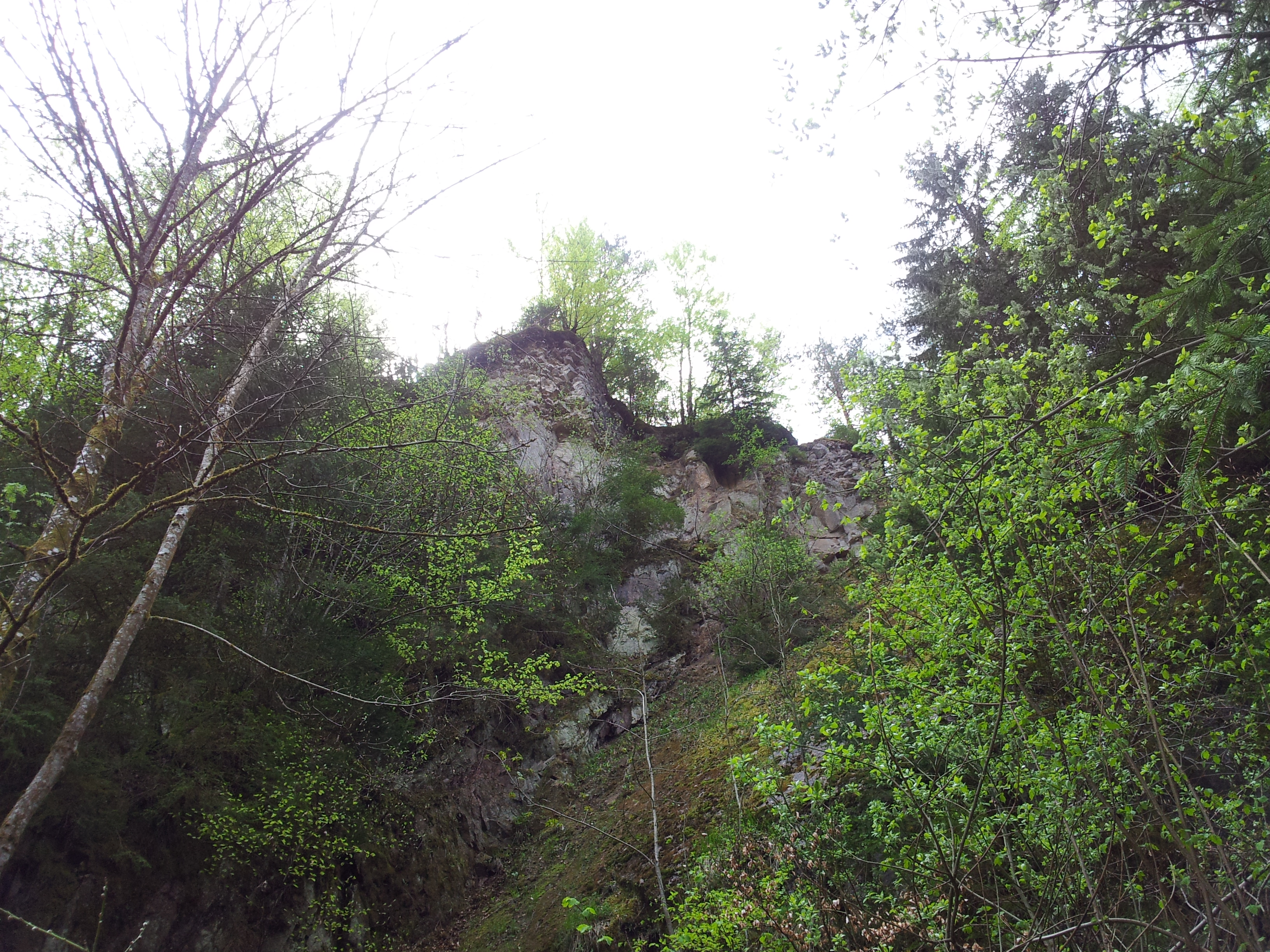 Burgruine Tiefenstein, Mauerreste Norden